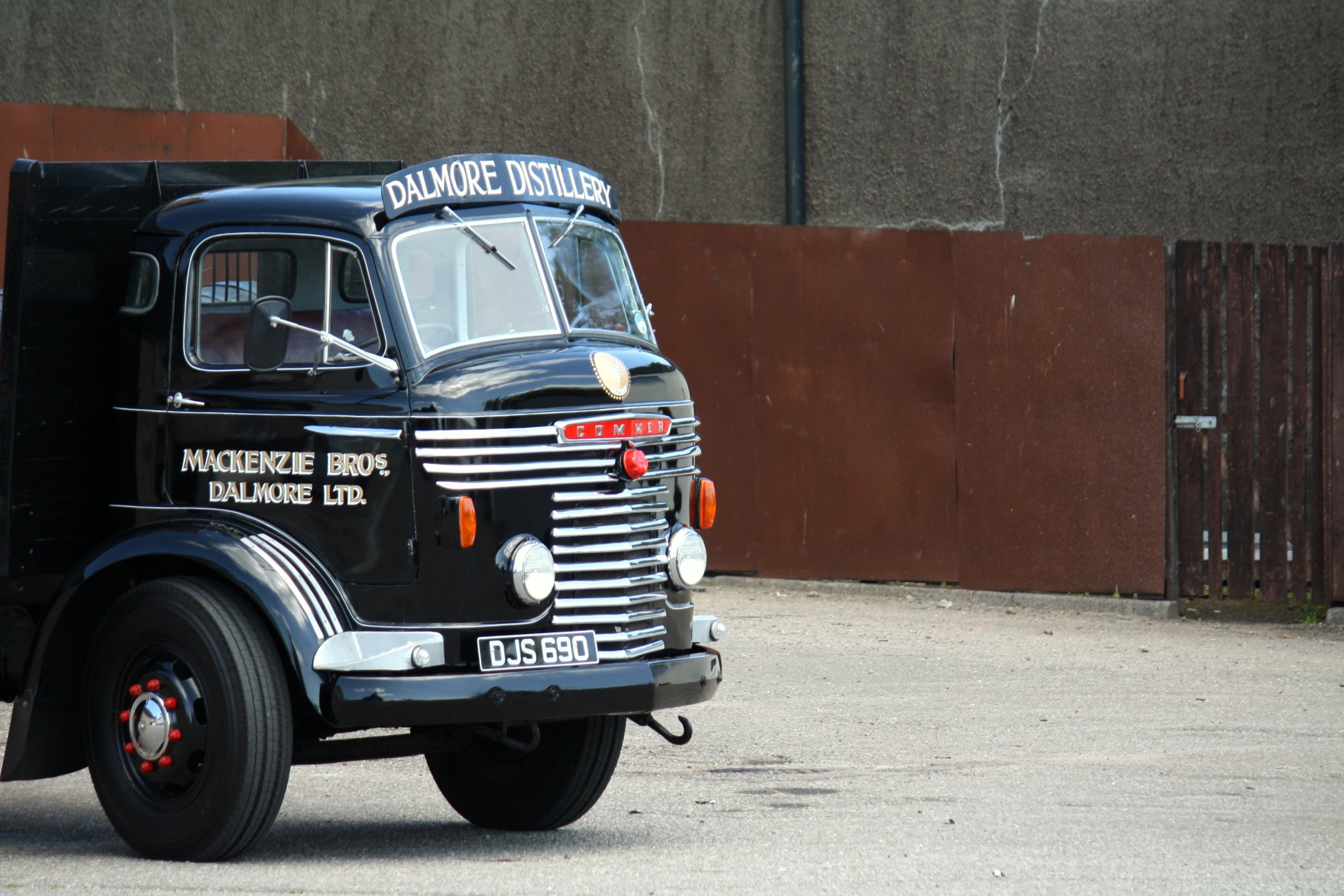 Dalmore Distillery